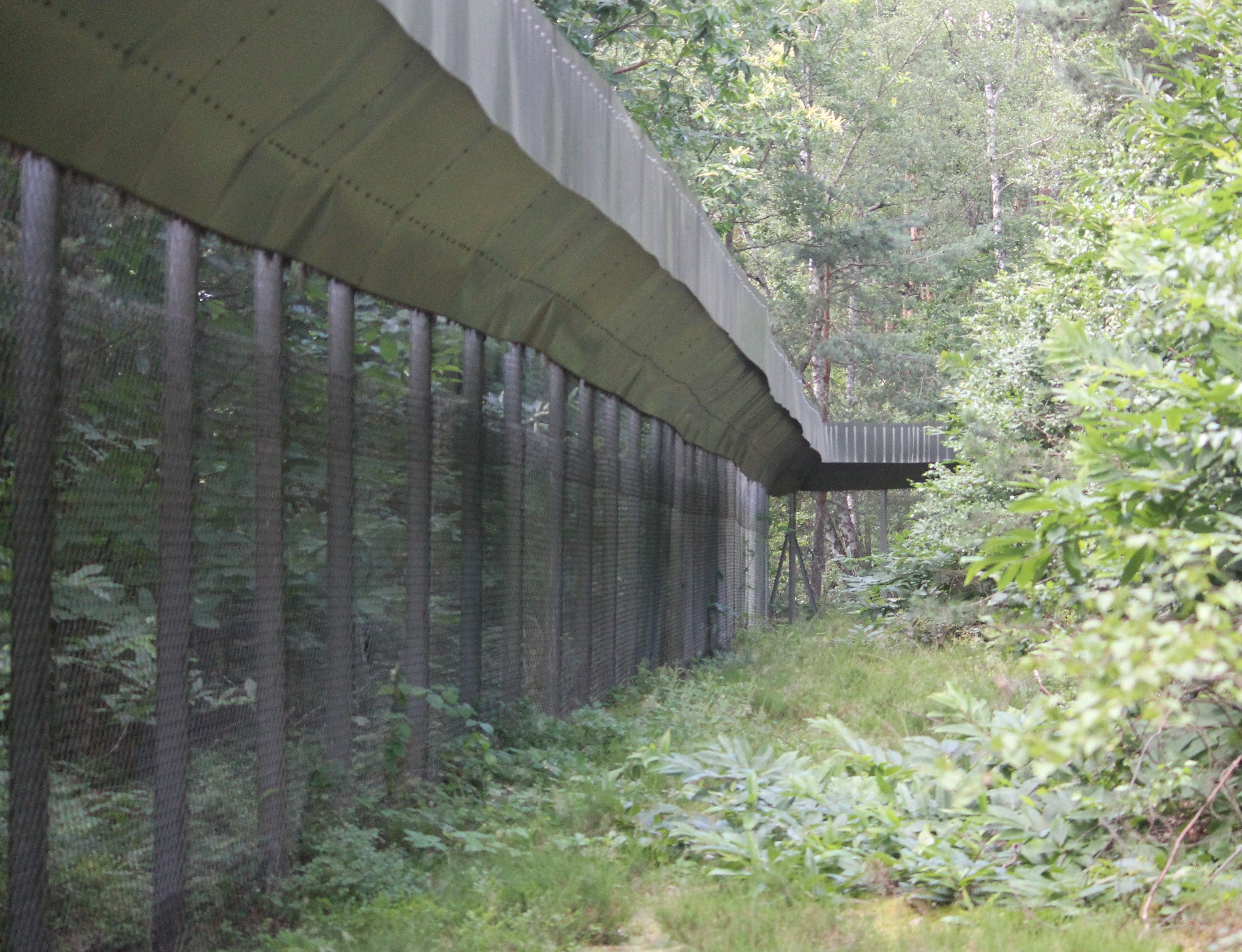 La Montagne des Singes, Kintzheim (2016)